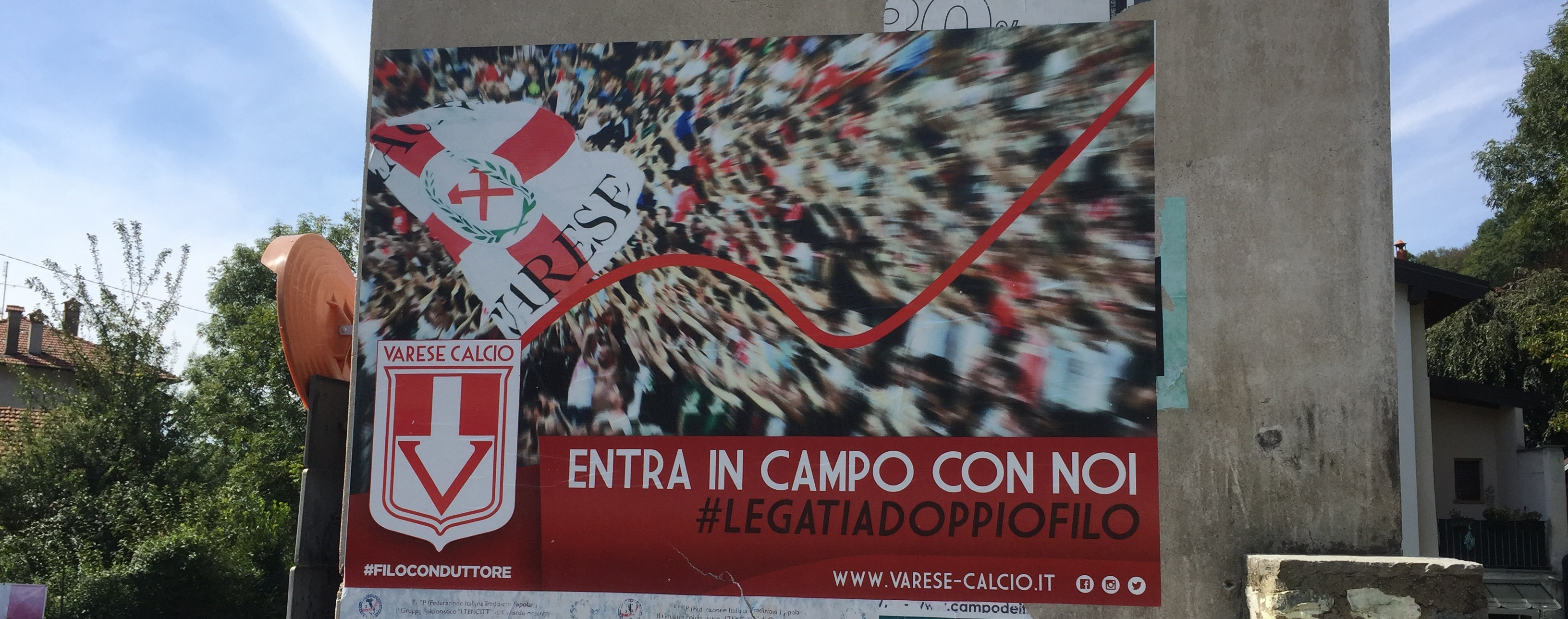 Manifesto della campagna abbonamenti del Varese Calcio per la stagione 2017-2018. Affisso nel comune di Brinzio.